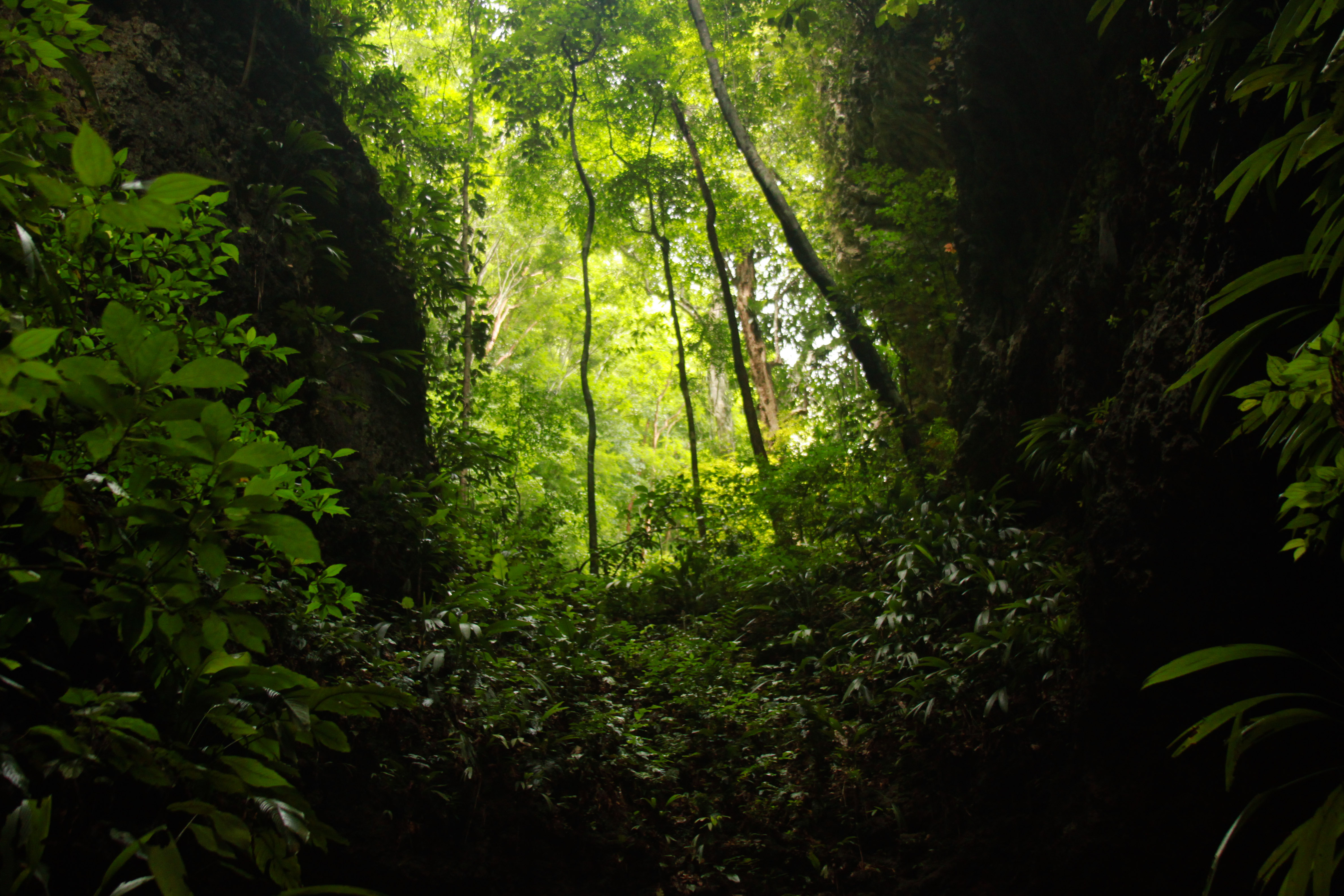 Alrededores de la cueva